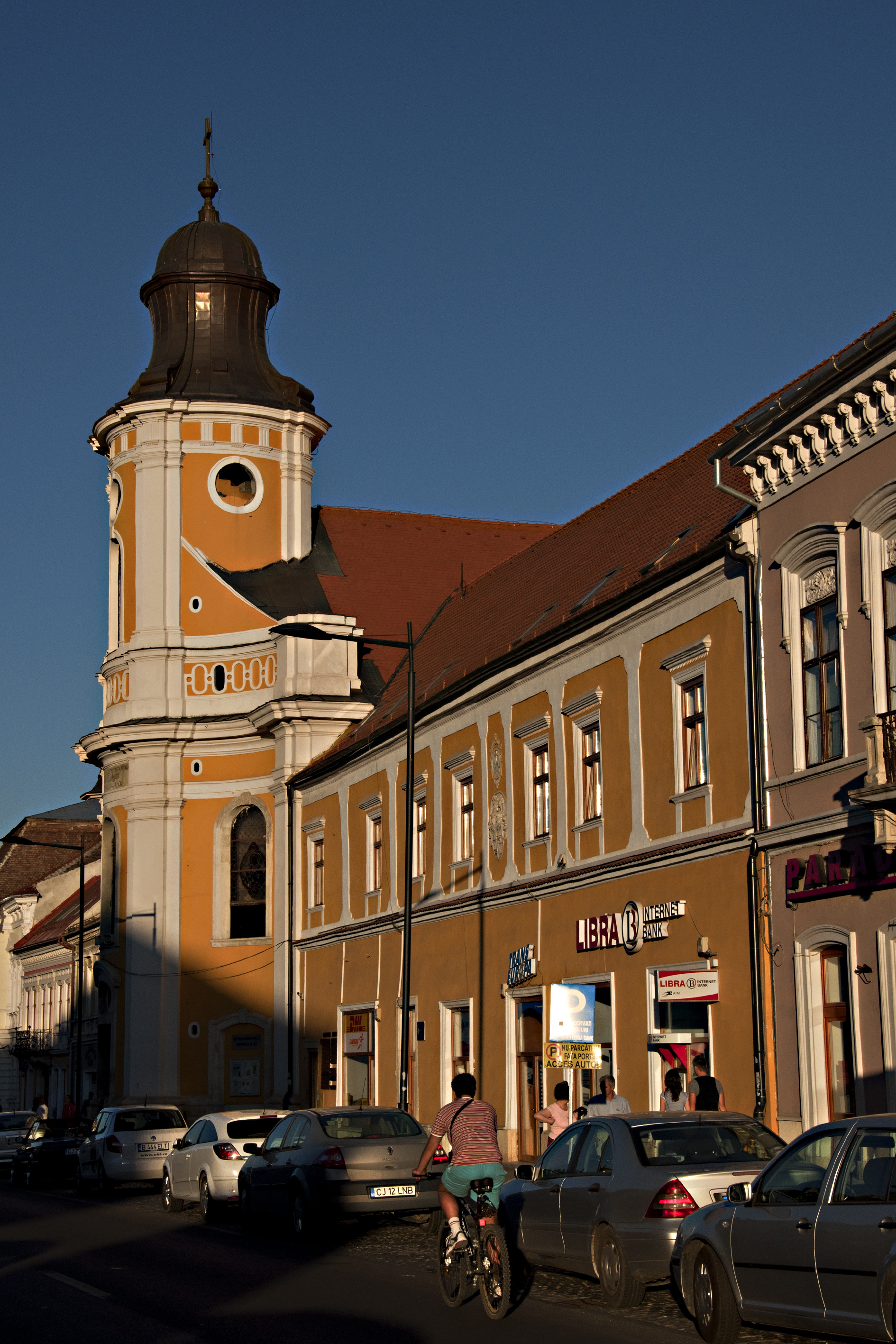 Biserica mănăstirii minorite, azi catedrala greco-catolică 01